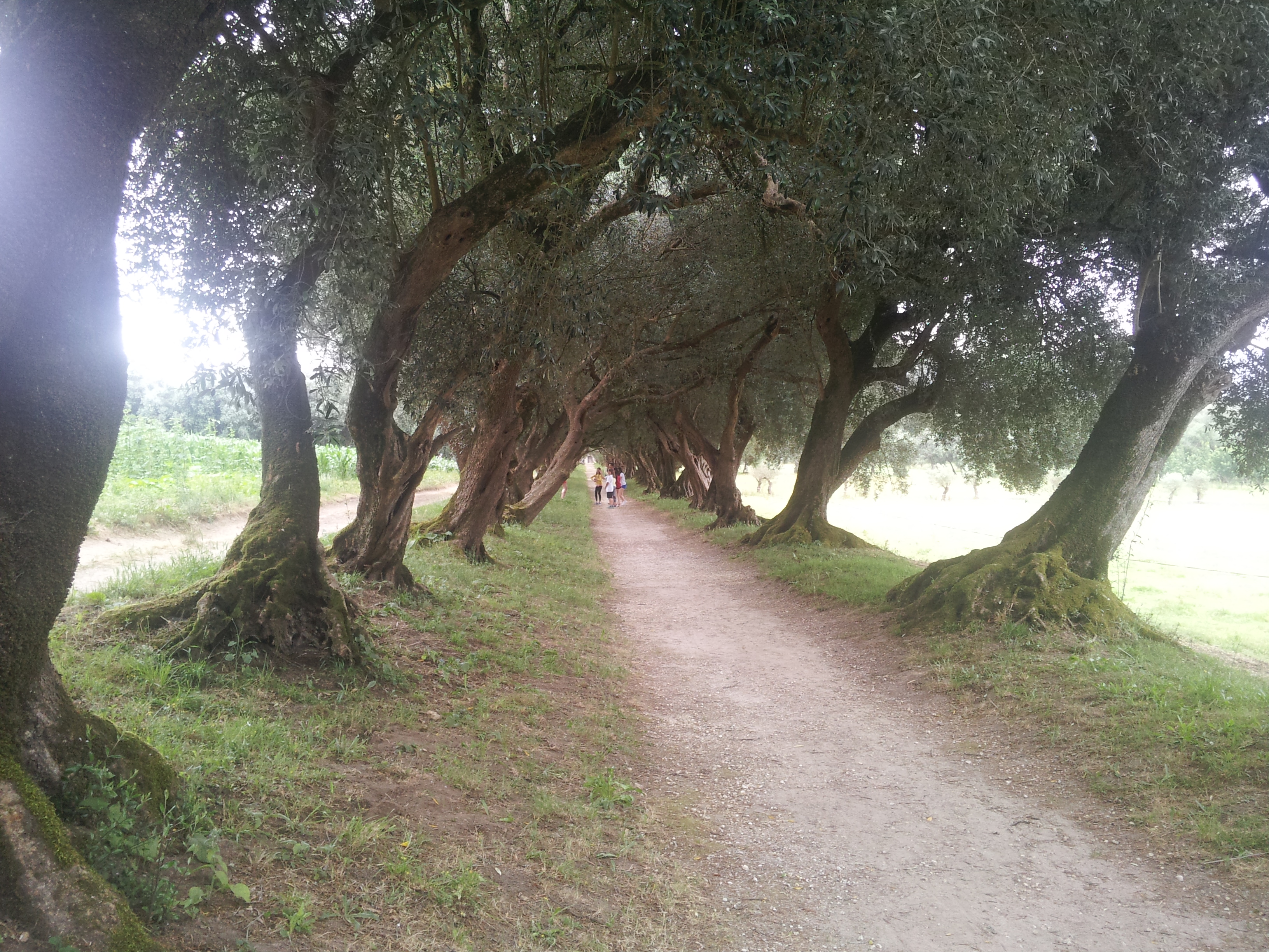 Olivos (Olea europaea)